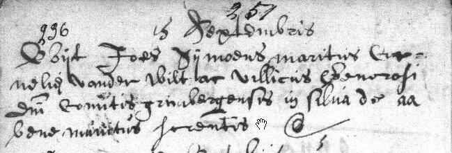 De overlijdensakte van Joannes Sijmoens, pachter van de graaf van Grimbergen, te Zemst overleden op 13 september 1635.